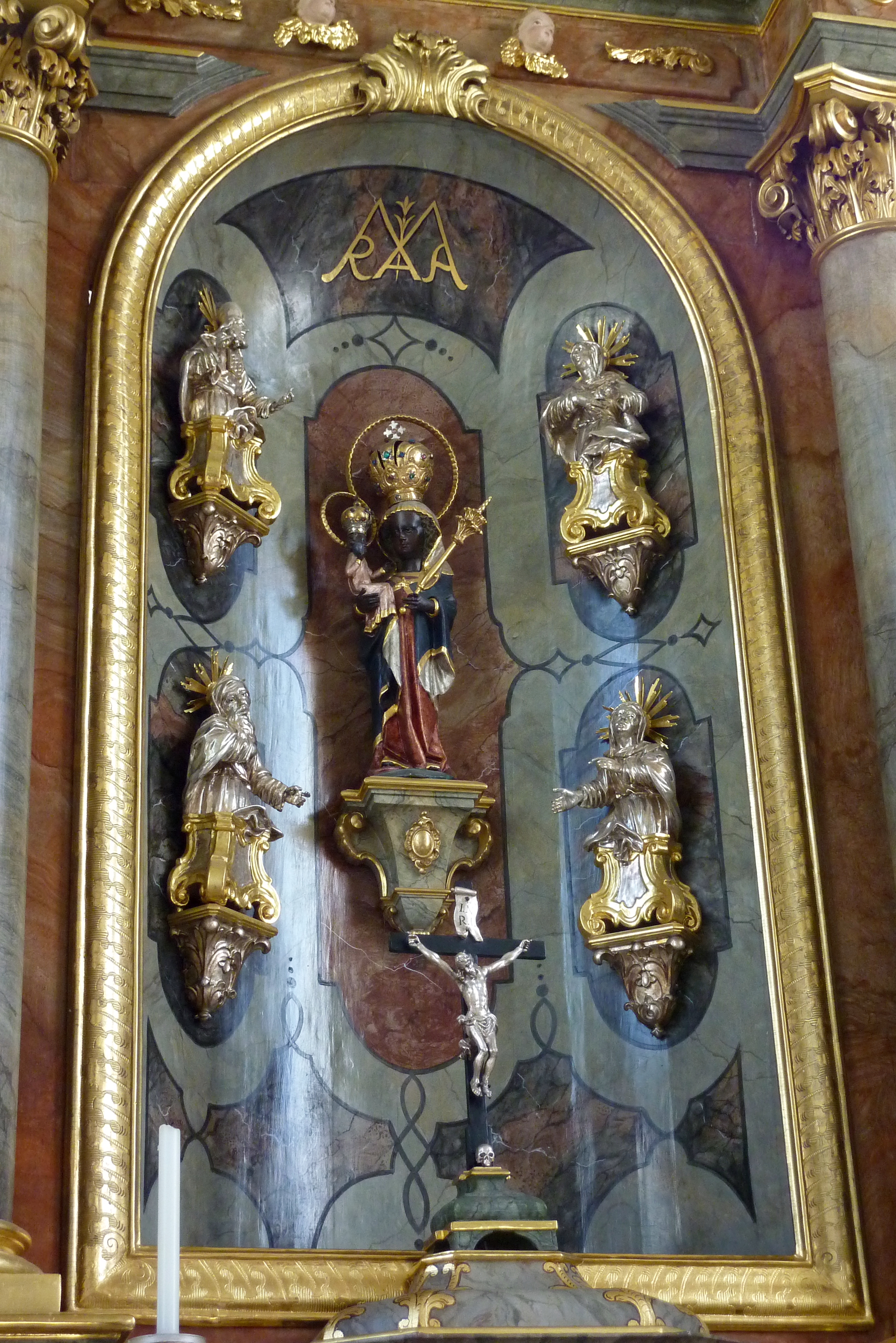 Katholische Pfarrkirche St. Maria Immaculata in Echenbrunn, einem Ortsteil von Gundelfingen im Landkreis Dillingen an der Donau (Bayern), Hauptaltar mit Gnadenbild, schwarze Muttergottes aus dem späten 15. Jahrhundert, umgeben von Figuren der Heiligen Sippe (versilbert)